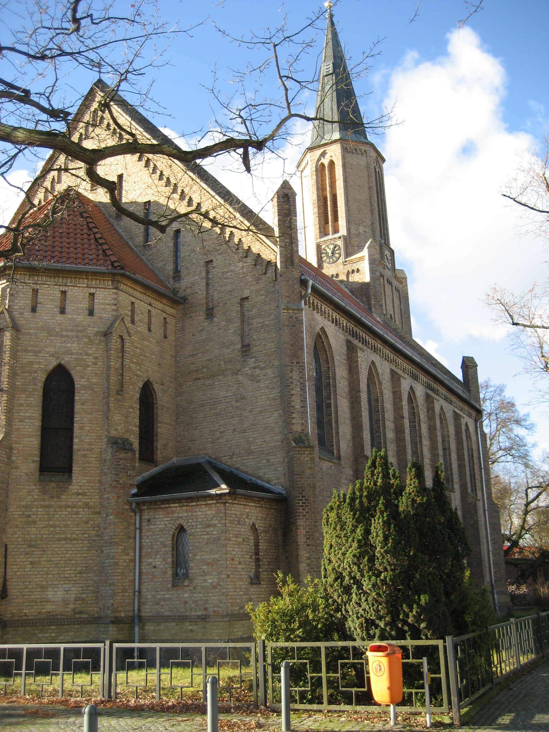 Löcknitzer Kirche aus Blickrichtung Nordosten, von der Chausseestraße/Ecke Marktstraße aus.